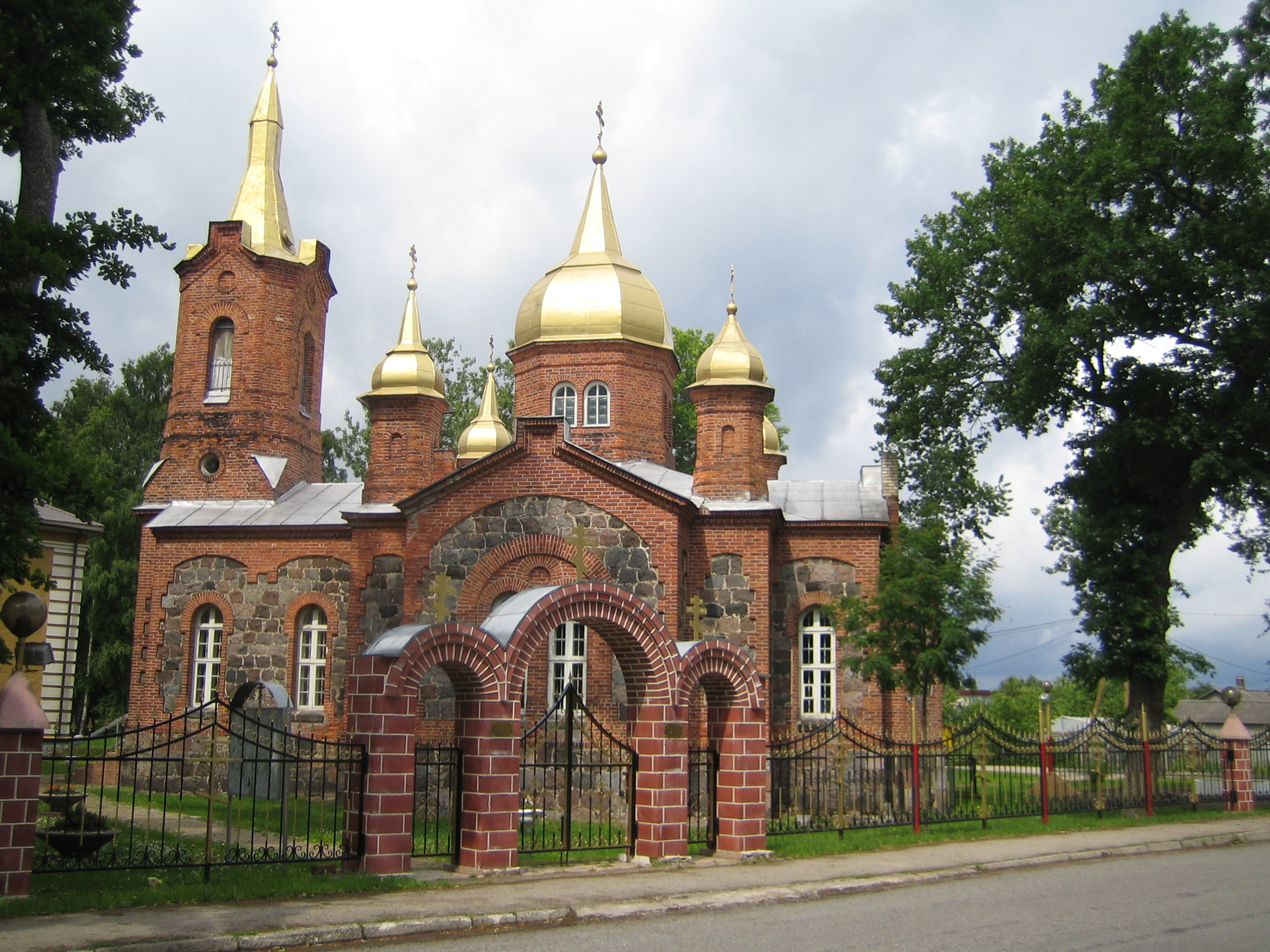 Püha Kolmainsuse Ainuusu kirik Mustvees